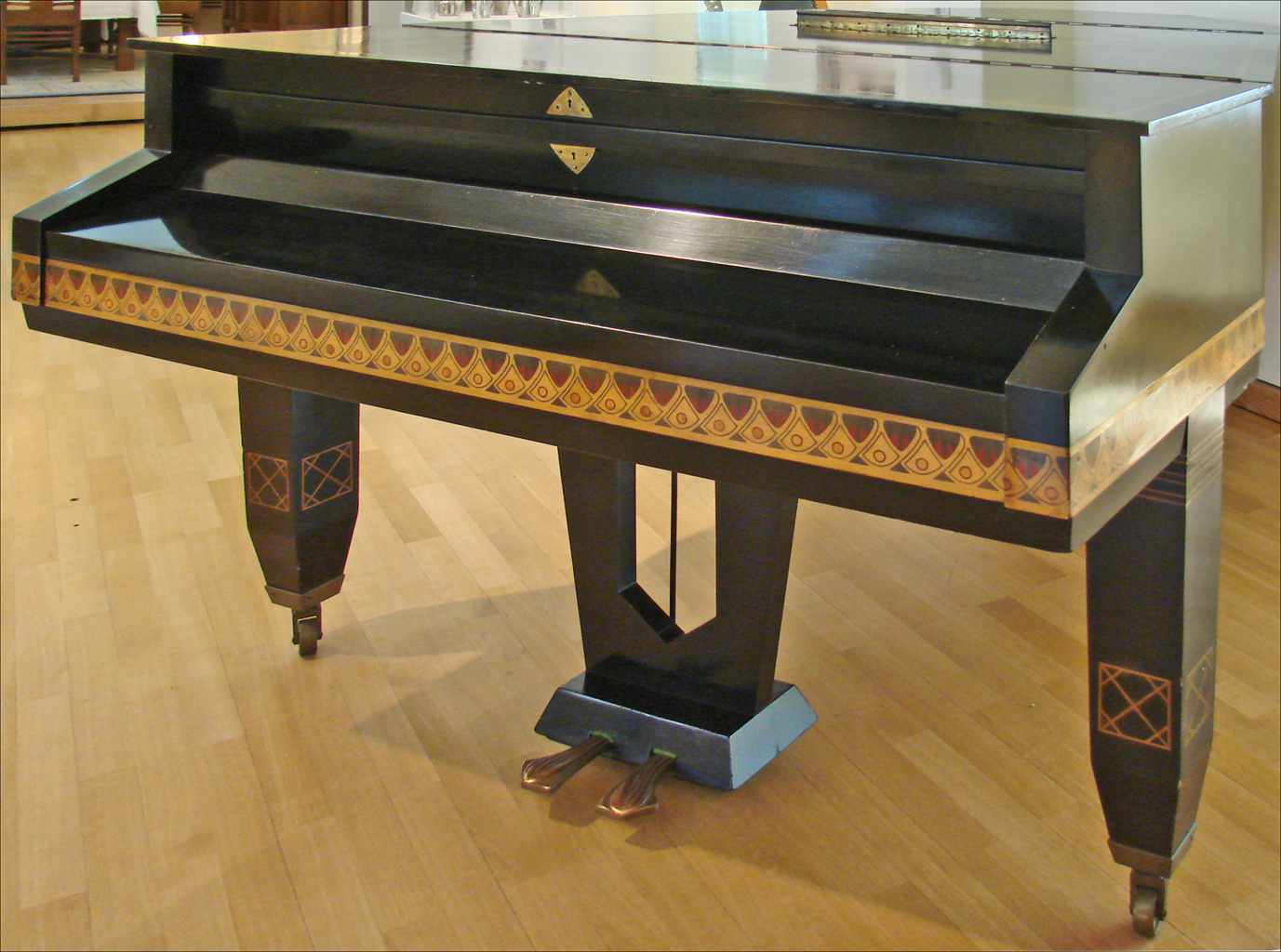 "Grand piano, décor conçu par Joseph Maria Olbrich" 1901 ébène verni, marqueterie de bois précieux fabriqué par Pianoforte-Fabrik Carl Mand, Koblenz Musée de la colonie d'artistes de Darmstadt Site officiel de la Mathildenhöhe